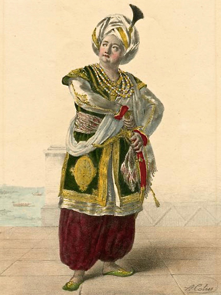 Nach Alexandre-Marie Colin (1798–1875): Der Tenor Adolphe Nourrit (1802–1839) als Tarare in der gleichnamigen Oper von Antonio Salieri (Musik) und Pierre-Augustin Caron de Beaumarchais (Libretto), Pariser Oper, 1823. Lithografie aus: Portraits d’acteurs et d'actrices dans différents rôles, F. Noël & Cie., Paris o. J.